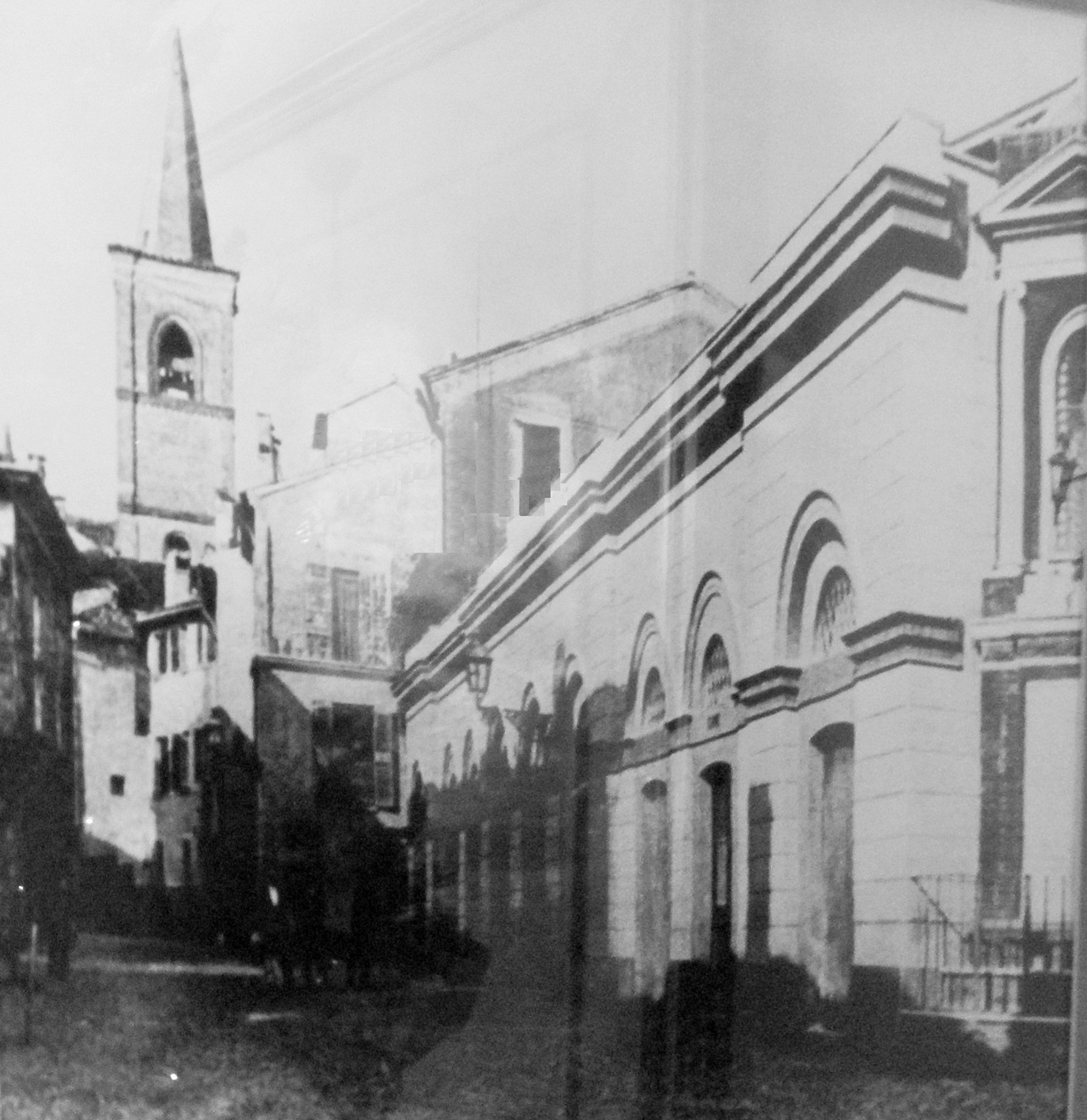 Antica foto della via quando vi sorgeva un edificio che ospitava il mercato del pesce dagli anni 30, poi demolito ed ora la zona è divenuta piazza Cortevecchia